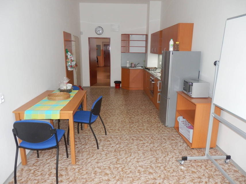 Cvičná kuchyně v sociálně terapeutické dílně, Tábor